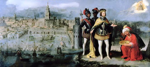 Rendición de Sevilla a Fernando III